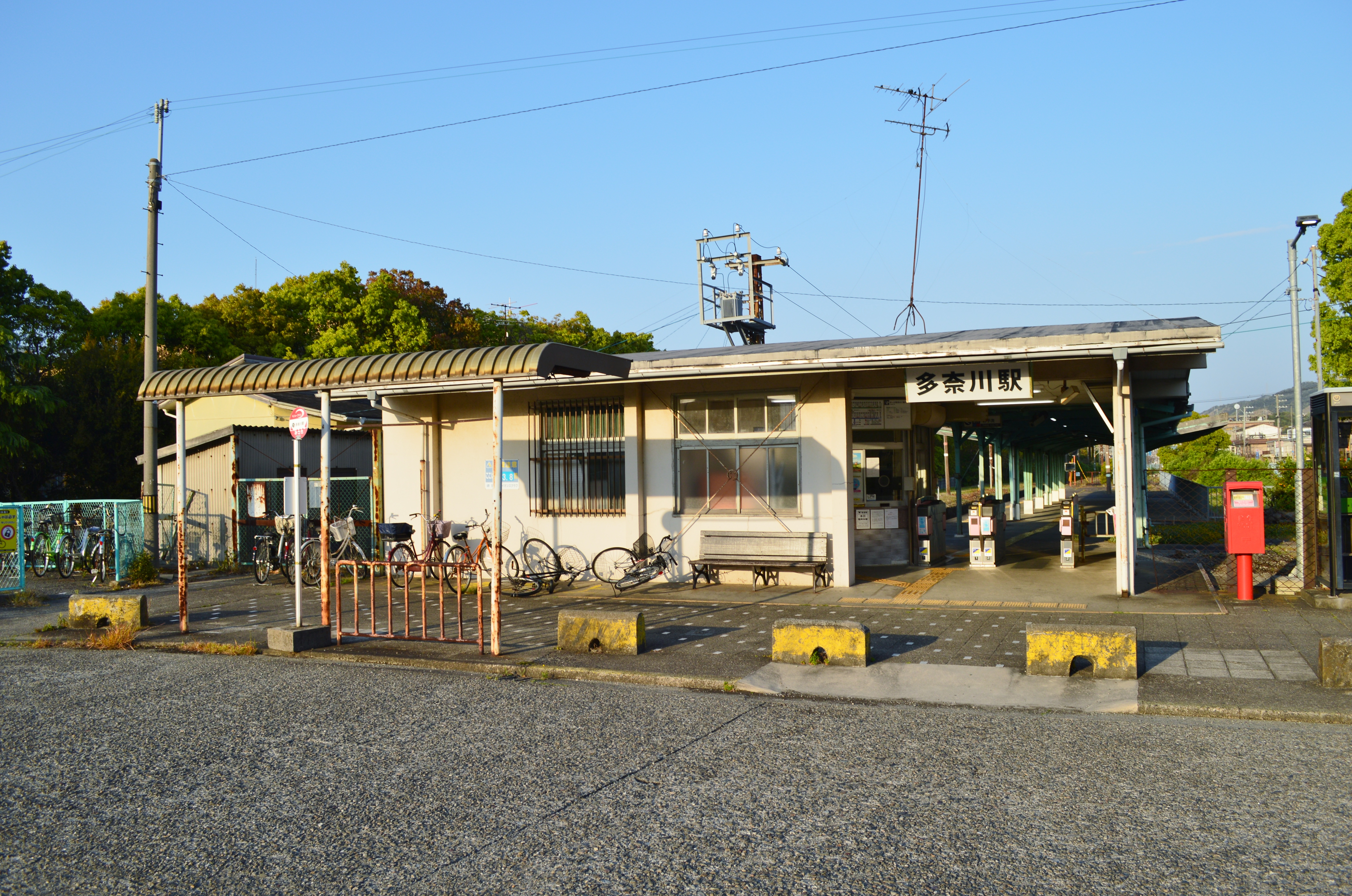 多奈川駅 駅舎